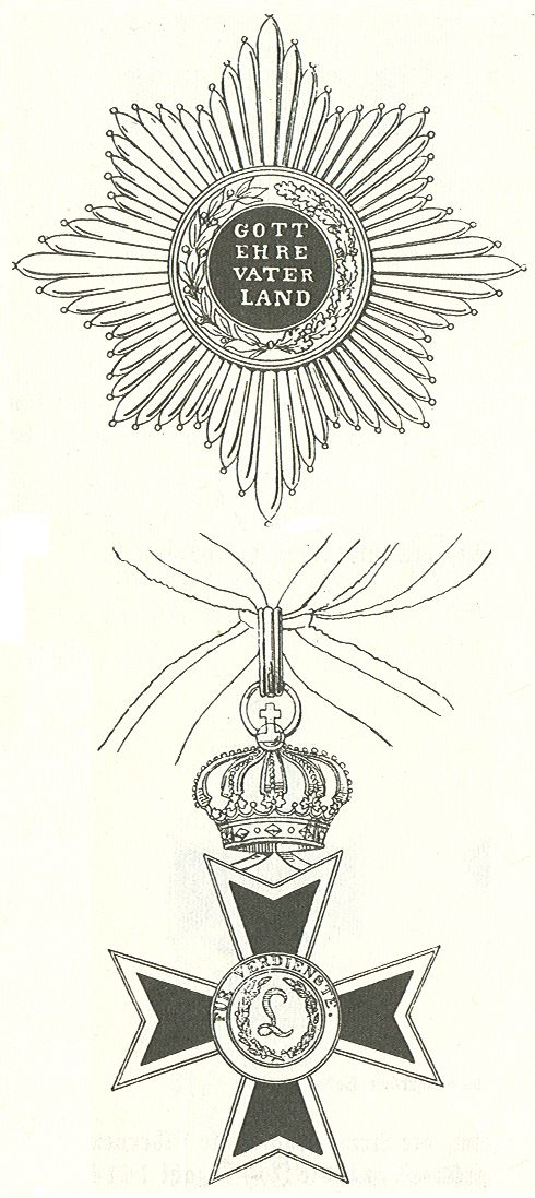 Scan van Blz. 148 en 149 van het boek "Handbuch der Ritter- und Verdienstorden " uitgegeven 1893 door Weber.Tekening van de in 1902 overleden Maximilian Gritzner. Robert Prummel 10 jul 2008 16:40 (CEST)